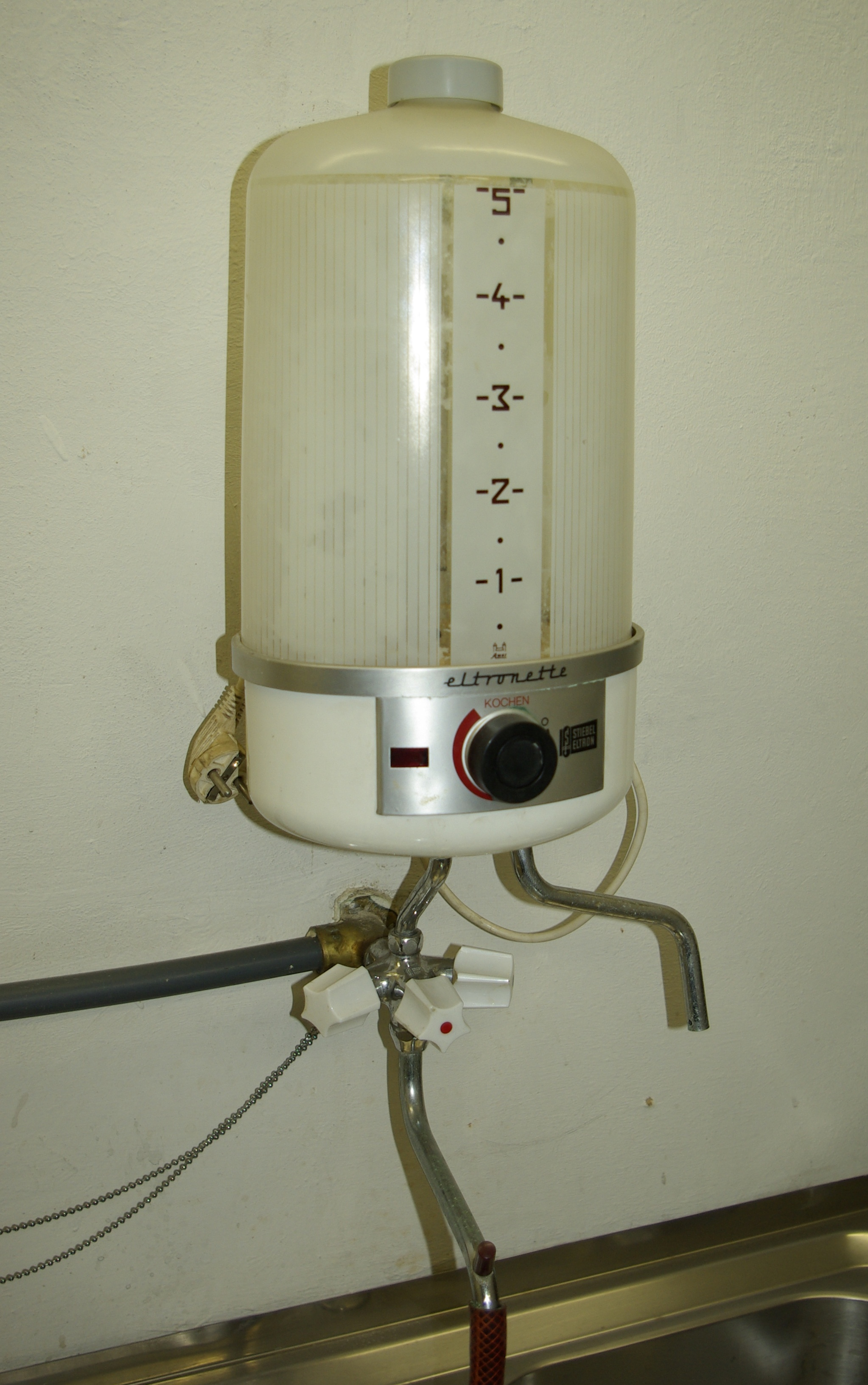 Färbertor-Bunker in Nürnberg, Kochendwassergerät Eltronette von Stiebel Eltron.